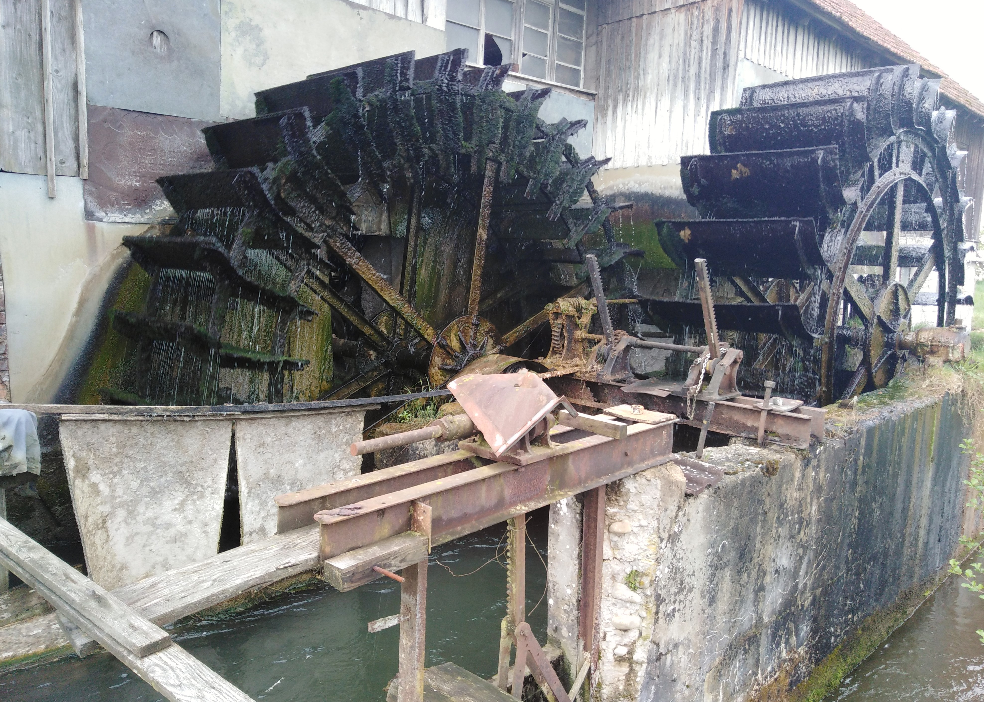 Lauchringen, Gemeinde im Landkreis Waldshut in Baden Württemberg. Die Bannmühle in Oberlauchringen. Die Mühlräder.